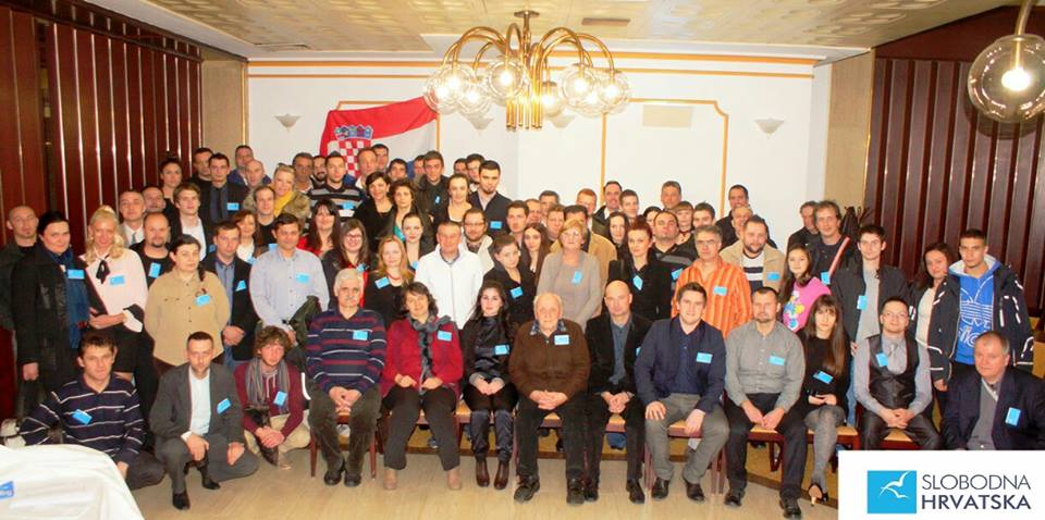 Osnivačka skupština Slobodne Hrvatske u Zagrebu 2016.